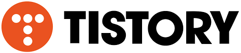 Logo de Tistory